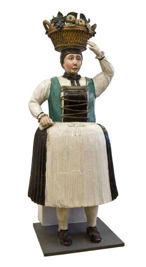 Figurenofen aus dem späten 18. Jahrhundert in Gestalt einer Mühlviertler Bäuerin. Herkunft: Münzbach Material: Fayence